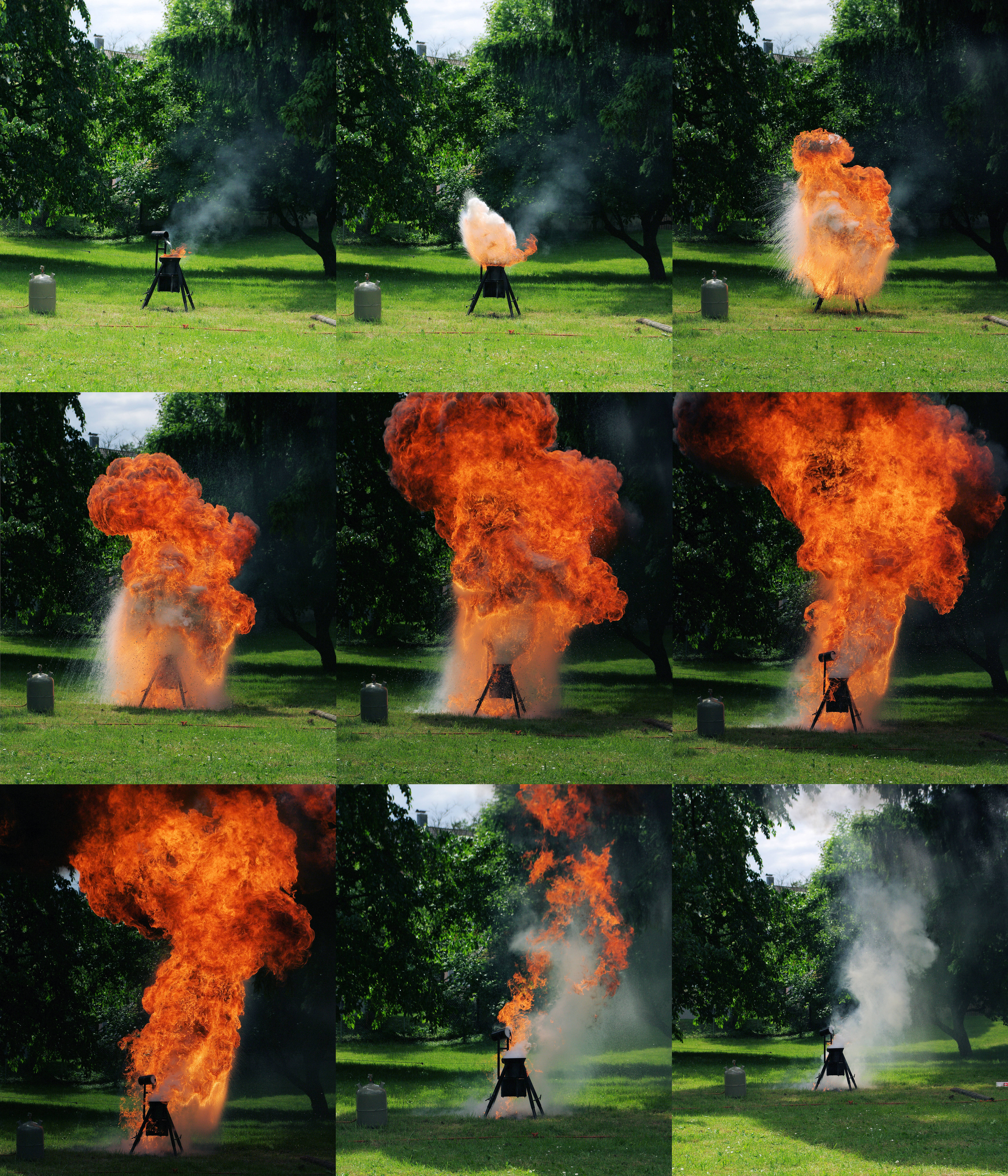 Ein Fettbrand /Fettexplosion simuliert von der Feuerwehr um die Gefährlichkeit zu demonstrieren. Länge der Sequenz 2.4 Sekunden. Einen Dank an die freiwillige Feuerwehr Freiburg Abteilung 9 - Lehen für die Vorführung